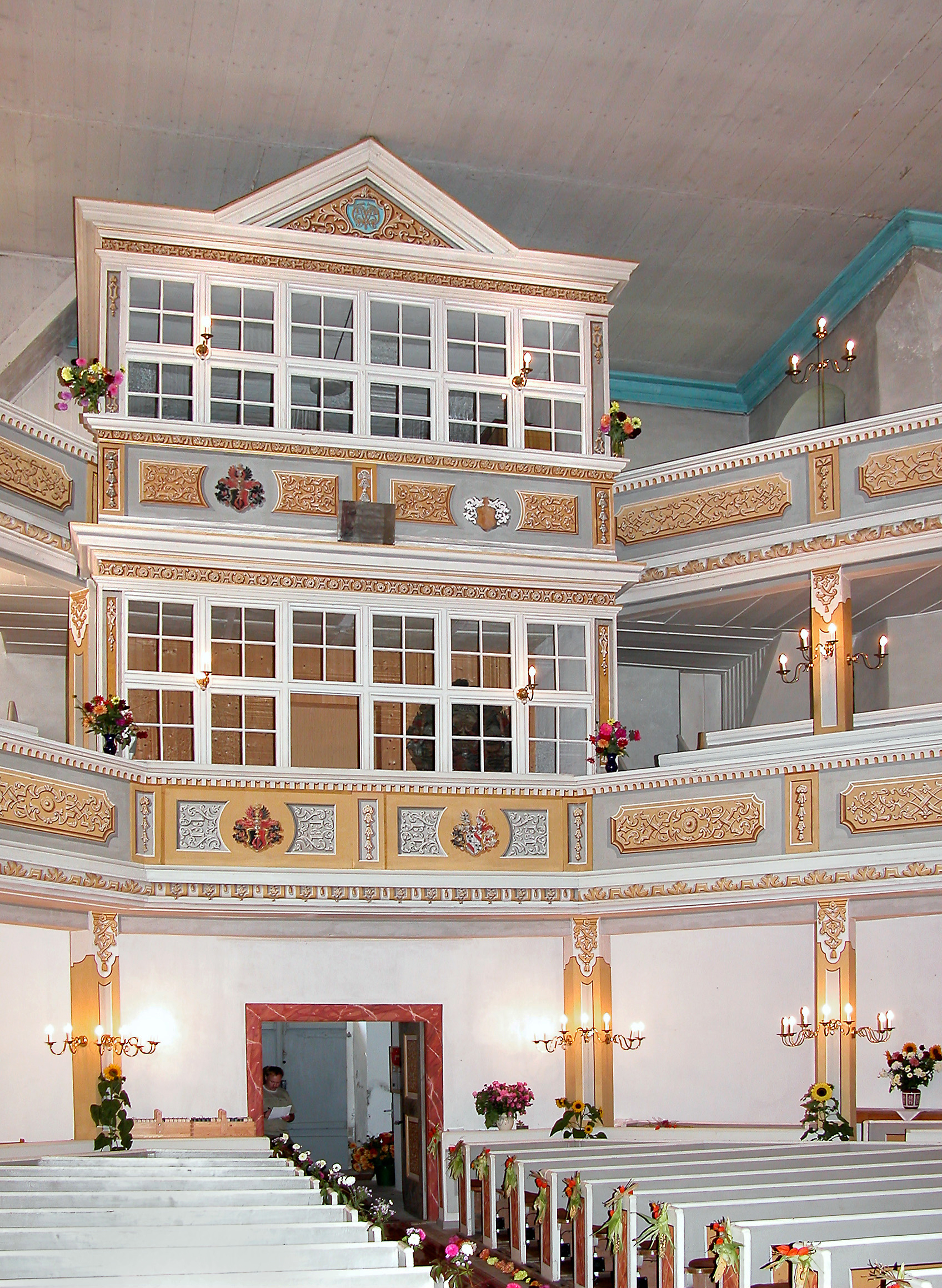 24.09.2006 09509 Forchheim (Pockau-Lengefeld), Kirchstraße: Evangelische Dorfkirche (barocker Zentralbau, 1719-26 von George Bähr und J. G. Fehre). Patronatsloge. [DSCN11712.TIF]20060924295DR.JPG(c)Blobelt